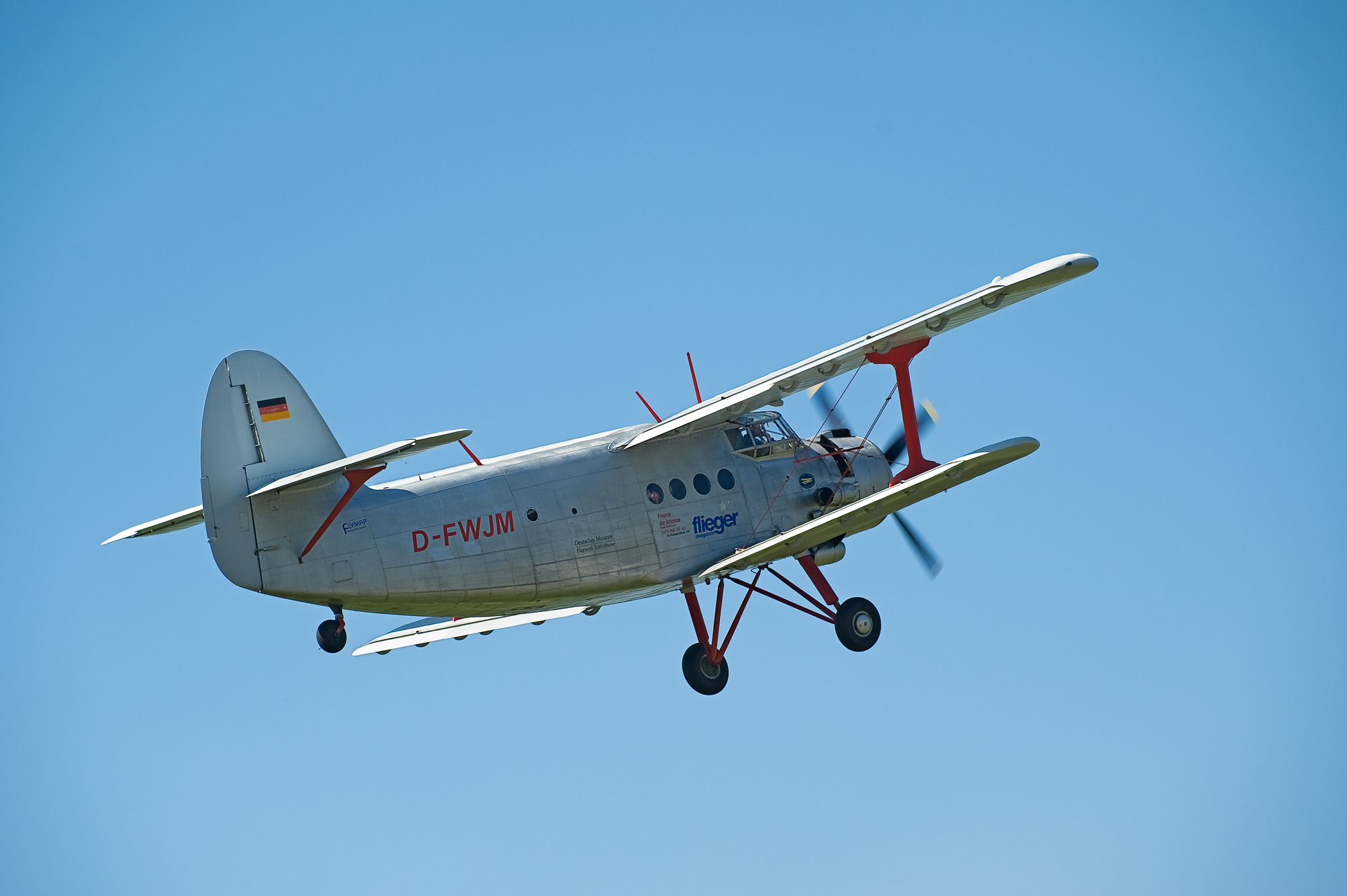 Antonow An-2, bei den Flugtagen "OTT 2011" auf dem Flugplatz Hahnweide, Germany